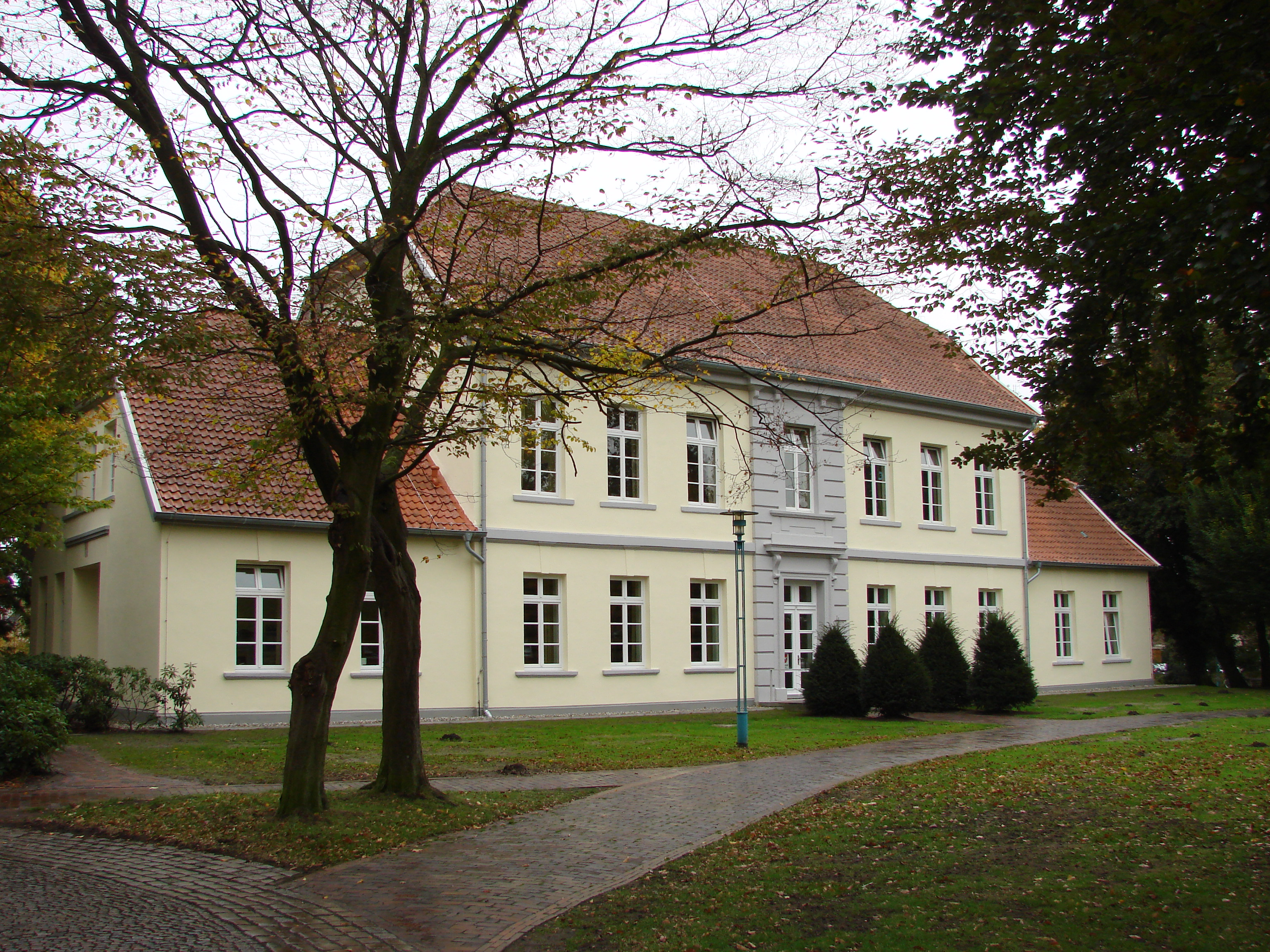 2006-10-29 10-31 Cloppenburg 039